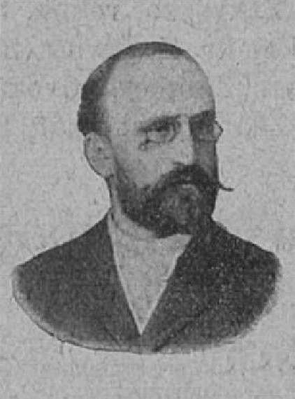 Karel Štolc (1859-1938), rakouský a český statkář a politik